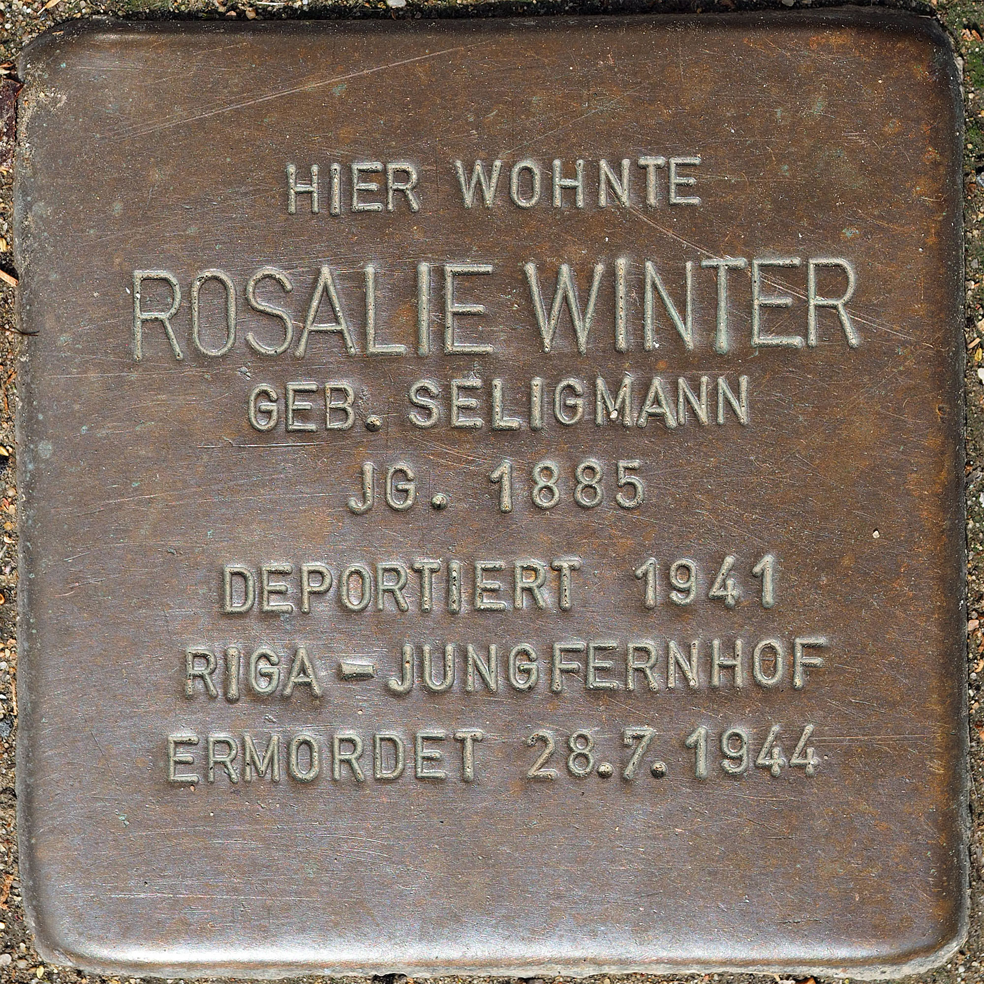 Stolpersteine GV: Winter, Rosalie